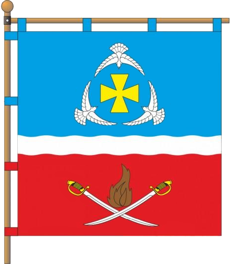 Прапор села Яськи